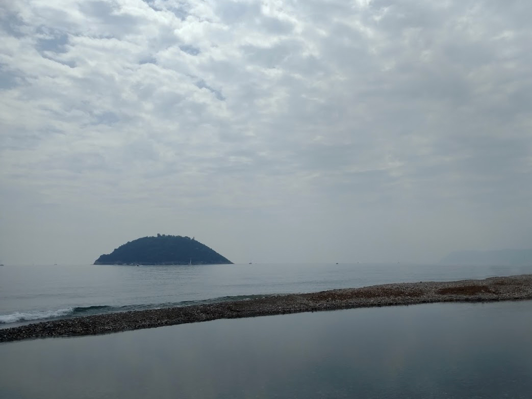 Gallinara eiland, getrokken in Albenga.